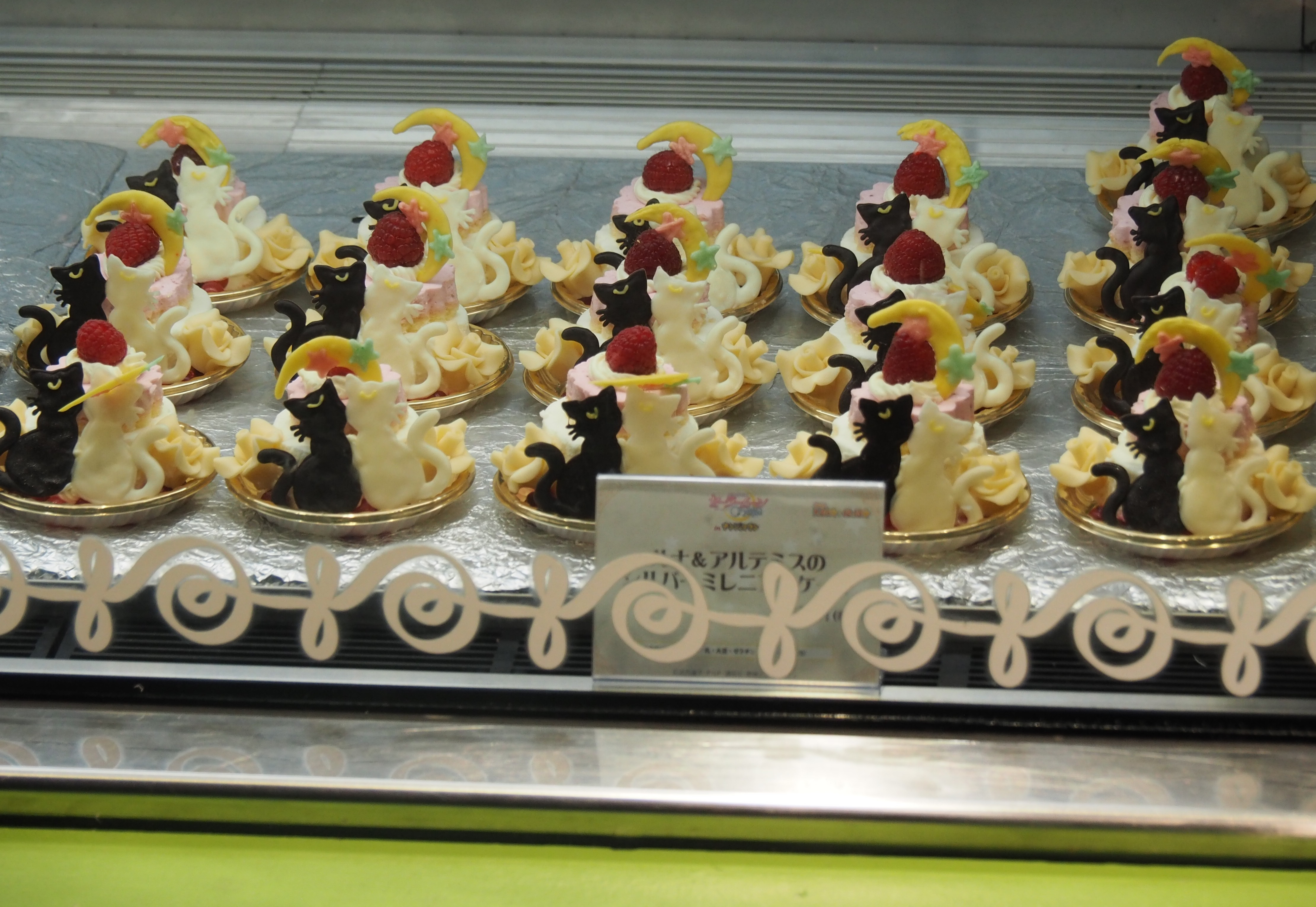 Namja Town